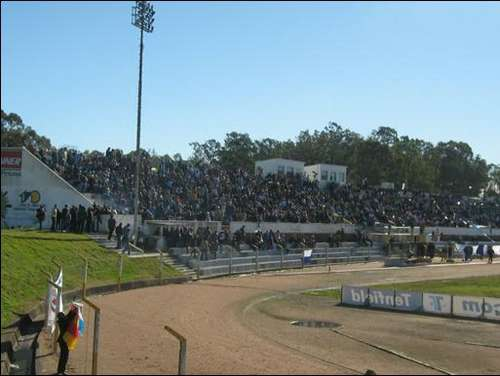 Imagem do estádio Empleados del Comercio no Uruguai.